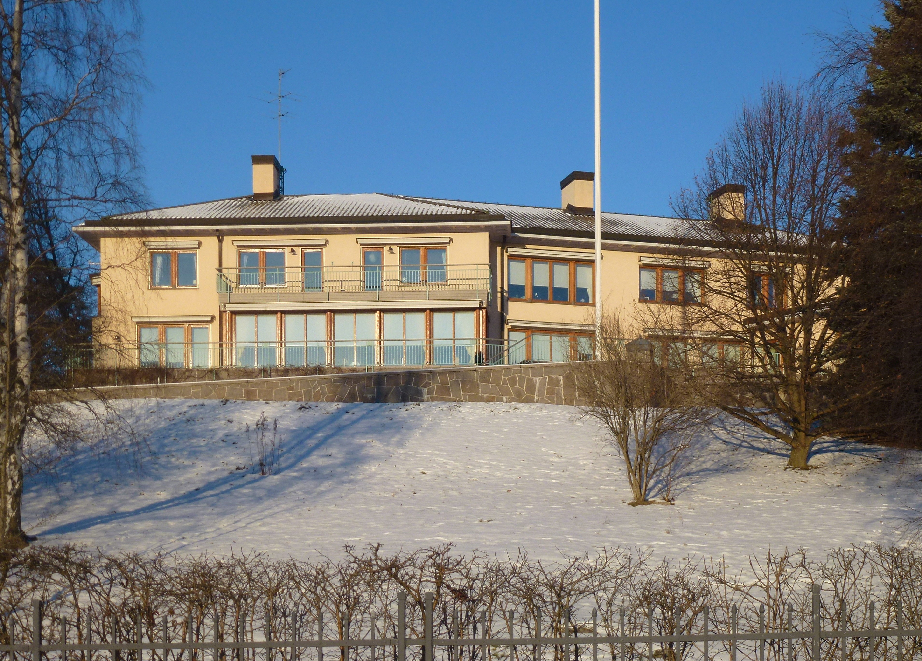 Villa Ekudden, Strandvägen 13, Djursholm, arkitekt Gillberg arkitekter